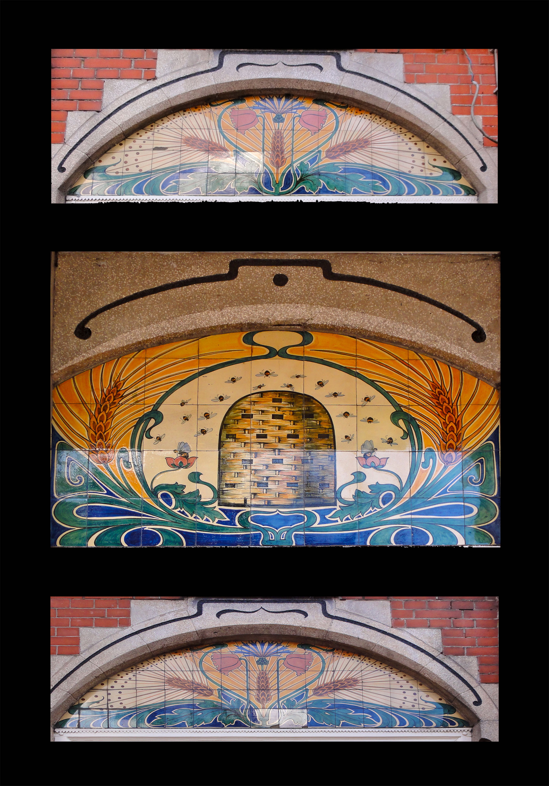 Jugendstilafbeeldingen aan de Hoofdstraat 34 Beetsterzwaag, tableaus gemaakt door de firma Van Hulst (architect Luitje de Goed)